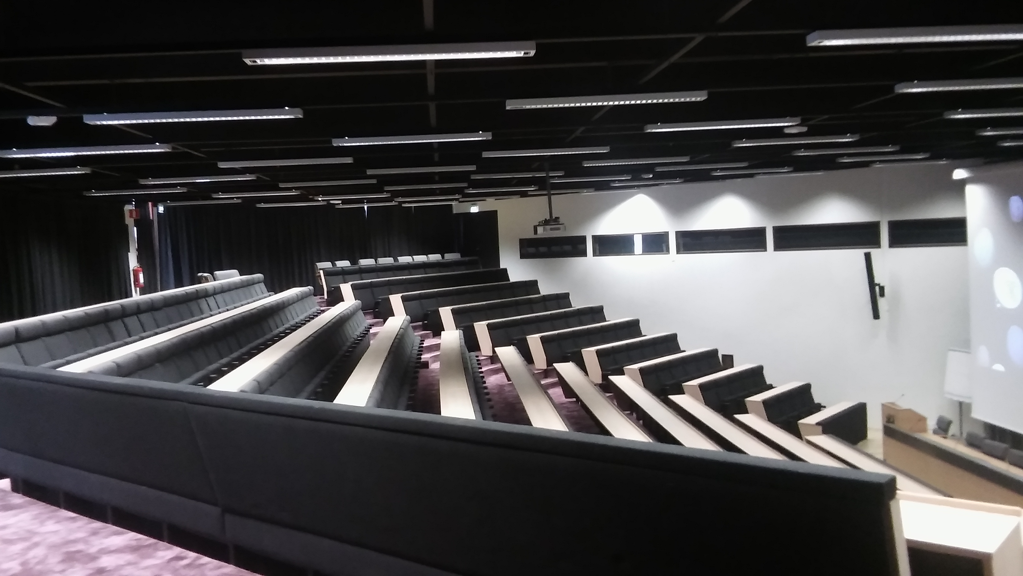 Hotelli Korpilammen auditorio